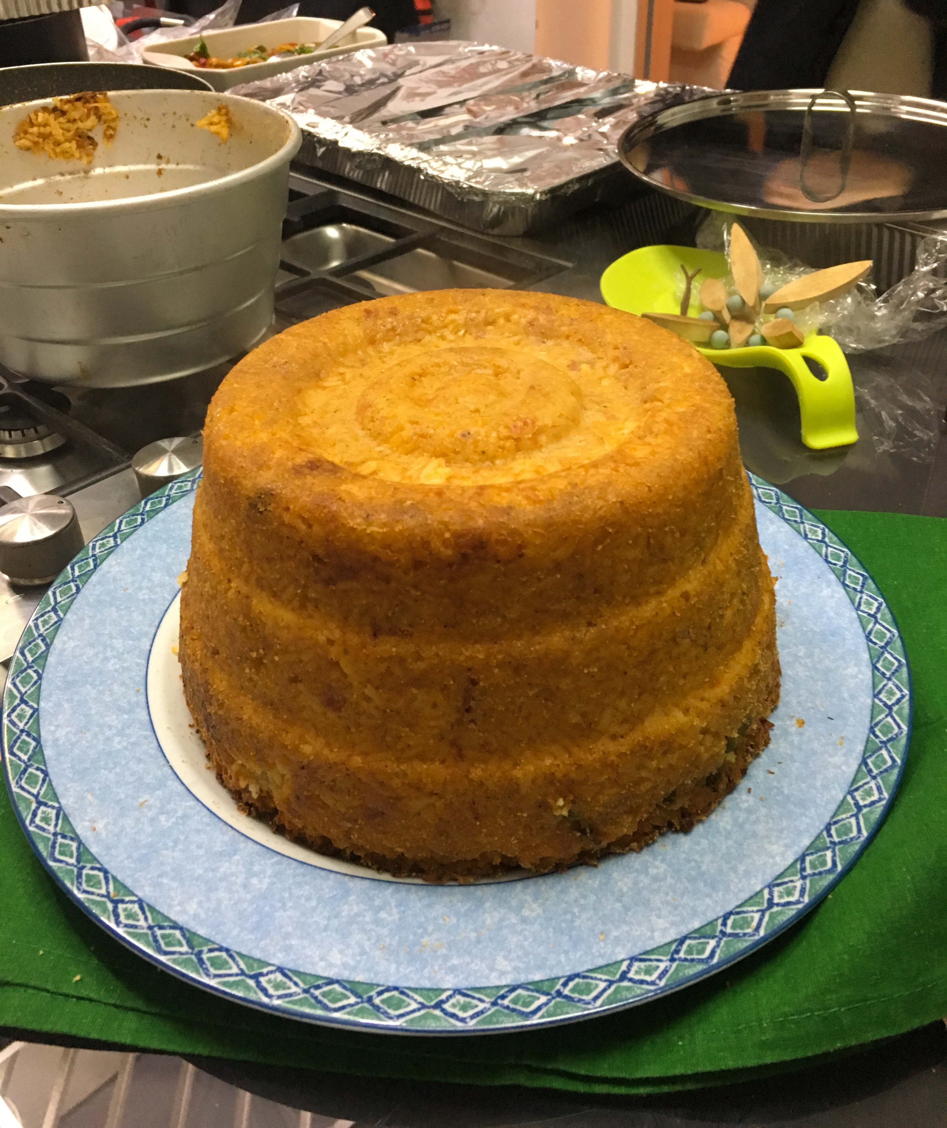 Sartù, come esce dal forno.